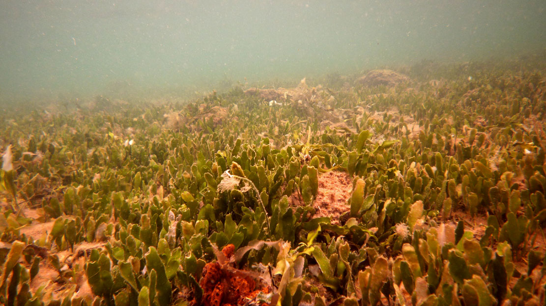 Caulerpa prolifera, planta invasora en las aguas del Mar Menor en Cartagena (Spain).